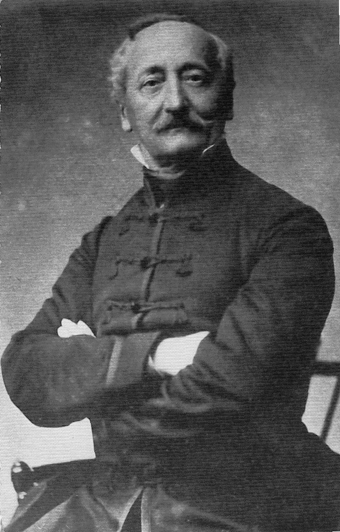 Portret Henryka Stefana Janki (1807-1887) z archiwum rodzinnego